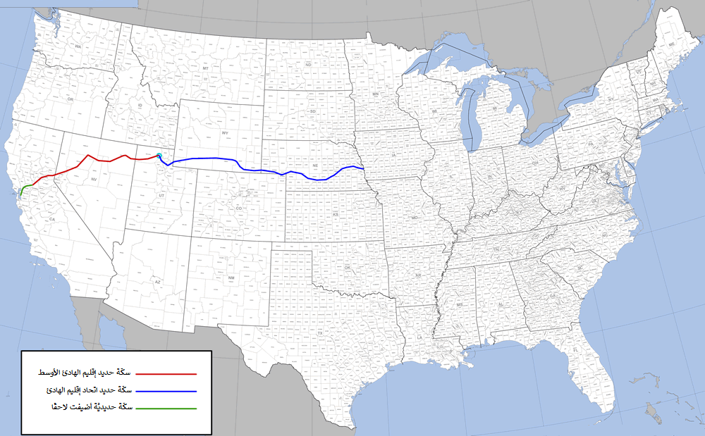 خريطة تُظهر مسار أول سكة حديدية ممتدة عبر القارة، وهي تعبر الولايات الأمريكيَّة الغربيَّة وُصولًا إلى\انطلاقًا من كاليفورنيا.